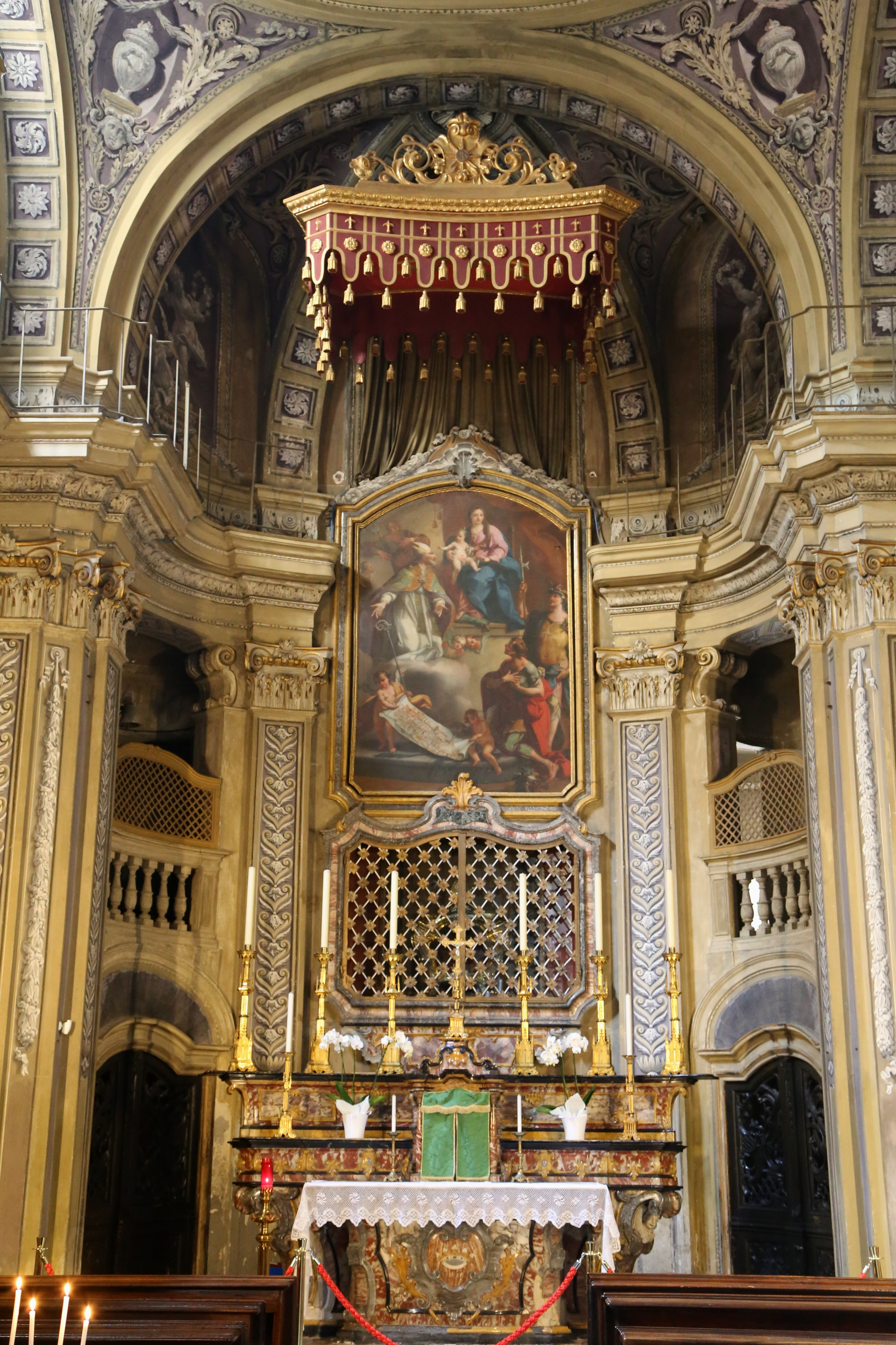 Duomo, Ivrea, Piemont